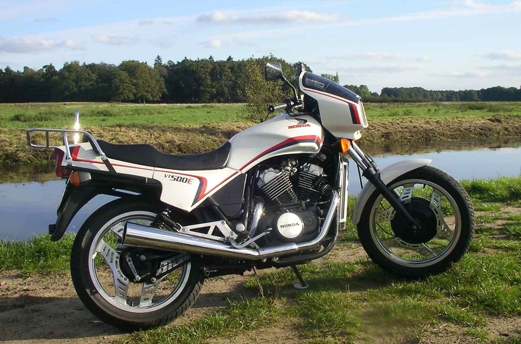 Motor Bike Honda VT 500 E PC 11 1984